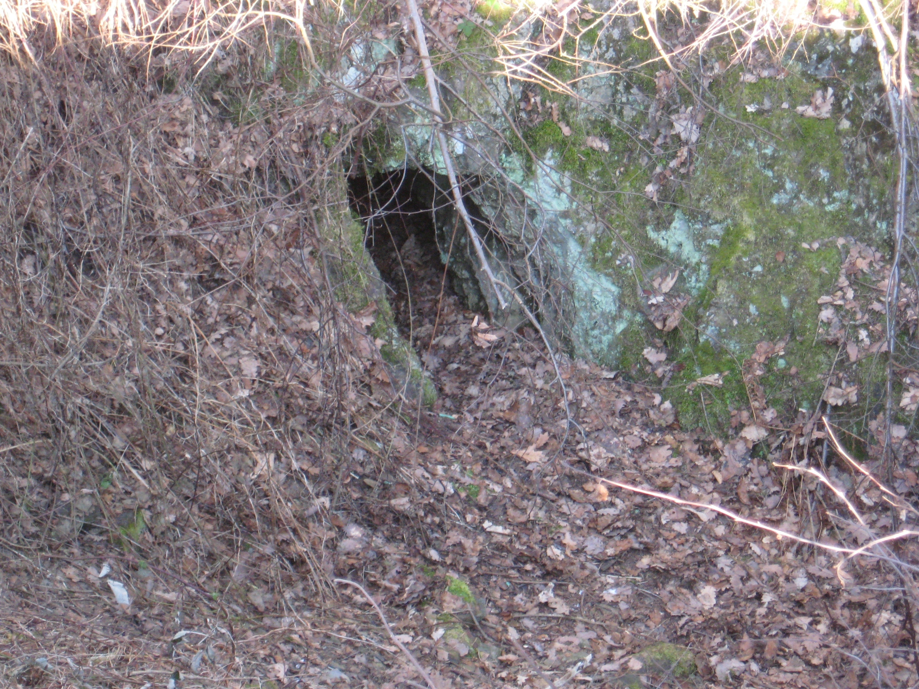 Ein Stollenmundloch in einer mittelalterlichen Pinge im Grubenfeld Arbach (Arbacher Einigkeit) in Neunkirchen-Salchendorf (NRW).